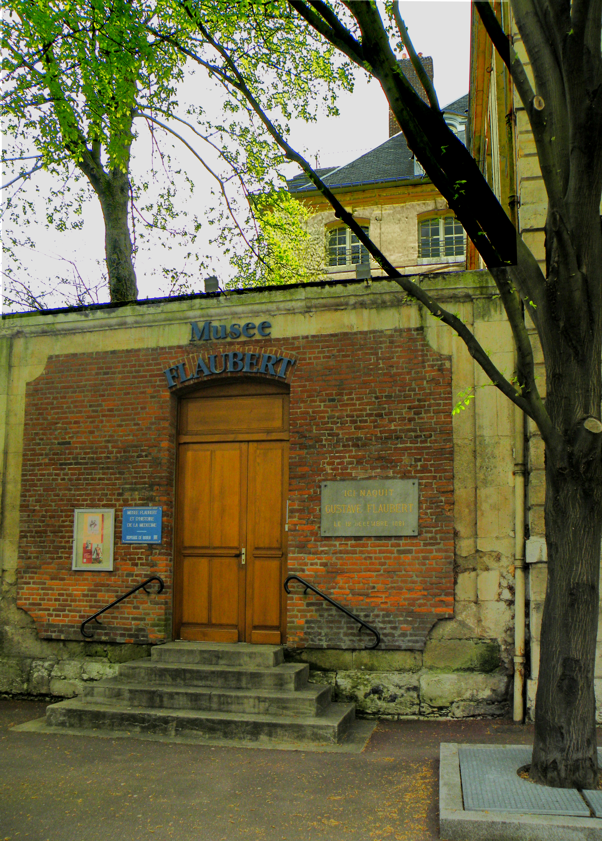 Дом, в которм родился Флобер и его музей.